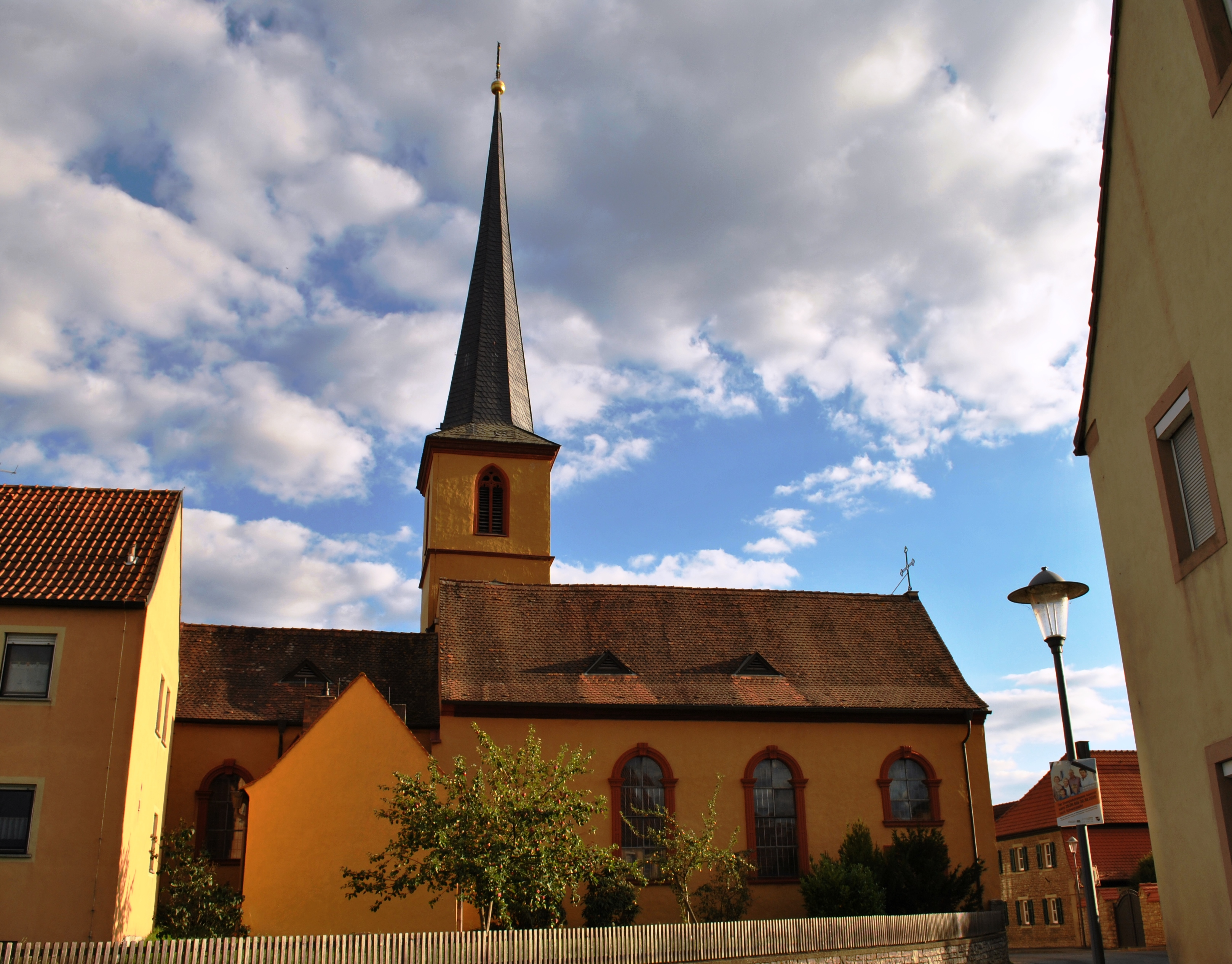 Katholische Filialkirche St. Ägidius Saalbau, Chor und Untergeschosse des Turmes erste Hälfte 15. Jahrhundert, Langhaus 1751; mit AusstattungThis is a photograph of an architectural monument.